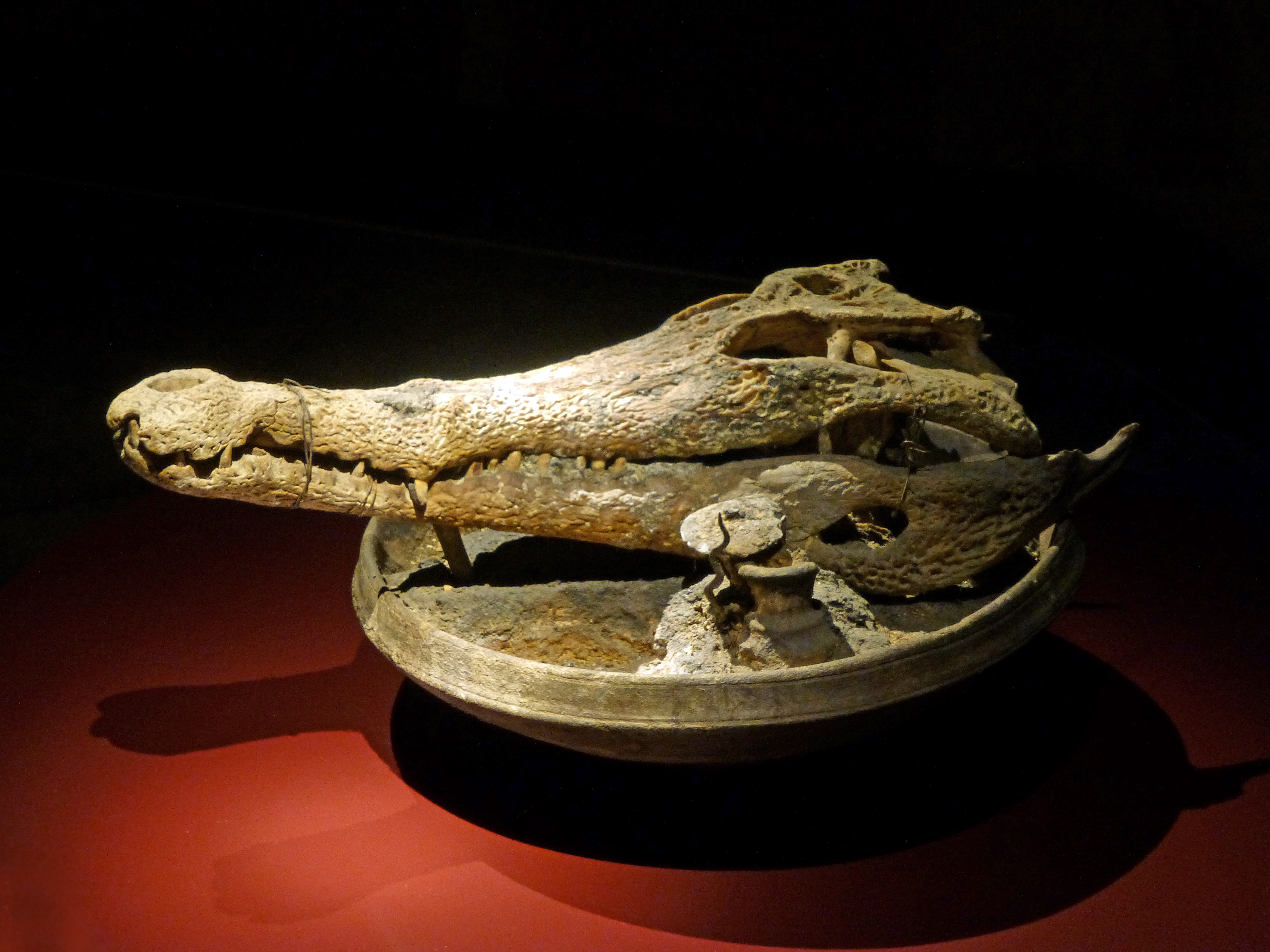 Le vodou crocodile Atchakpa. Population Guin, Togo, seconde moitié du 20e siècle. Crâne de crocodile, terre cuite, métal, terre, herbes et matières sacrificielles. Musée Vodou de Strasbourg